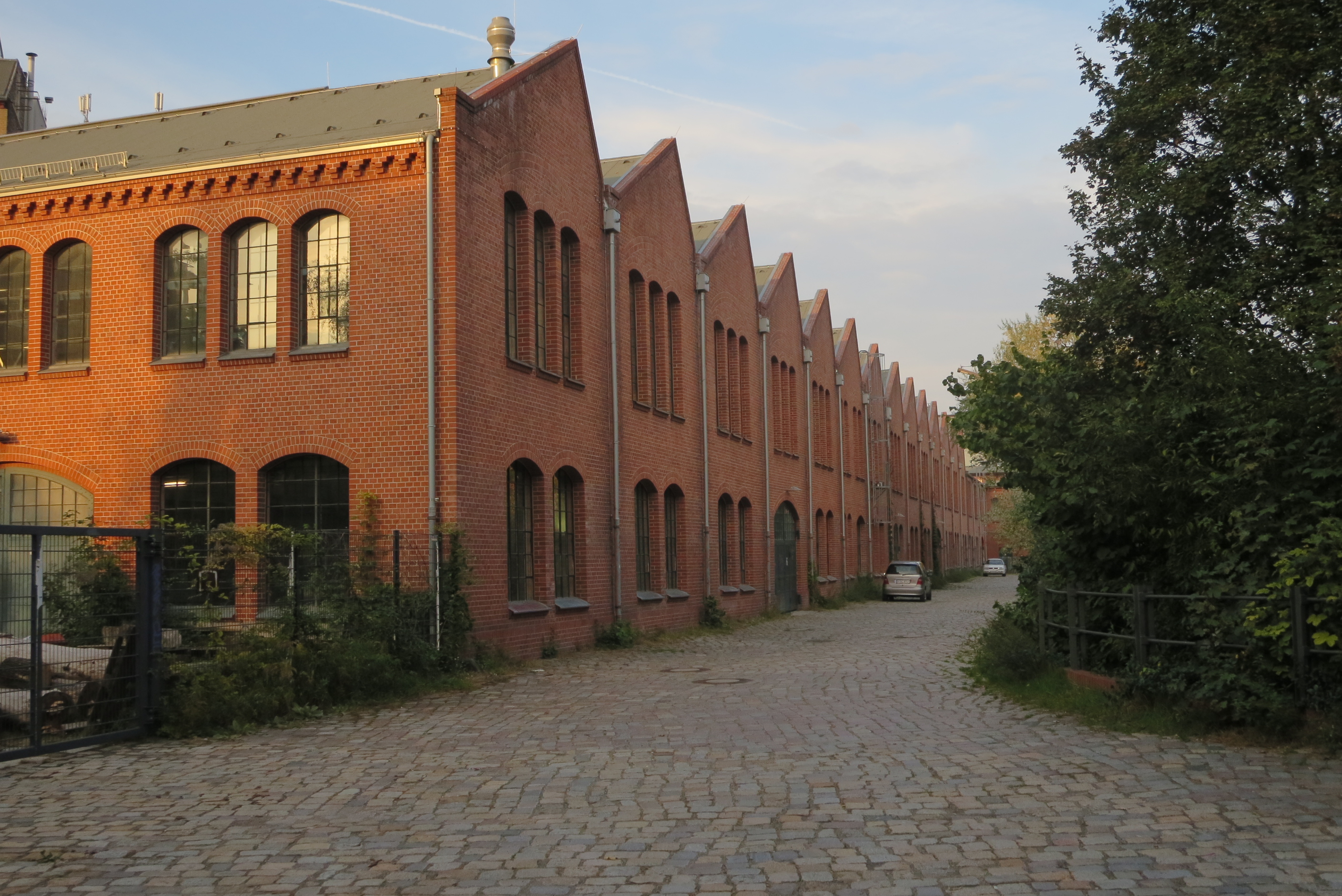 Tresorfabrik Karl Arnheim, Blick von Südwesten